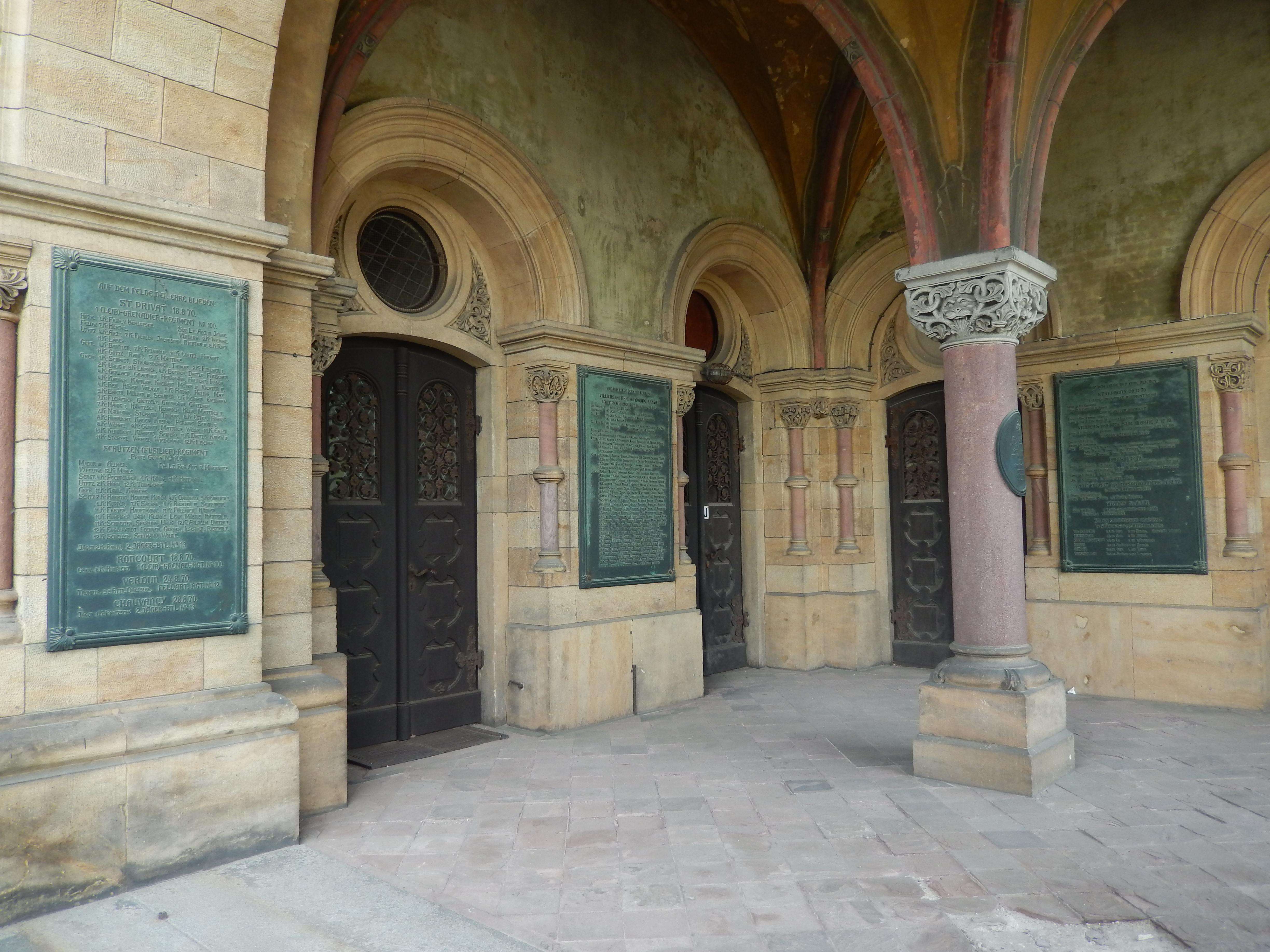 Germaniadenkmal (Dresden): Das Sächsische Kirchenamt sorgte für den Erhalt der Ehrenplatten mit den Namen der Dresdner Gefallenen des Deutsch-Französischen Krieges 1870 bis 1871 und ließ diese in einer offenen Ehrenhalle am Hauptportal der Garnisonkirche im katholischen Teil installieren.